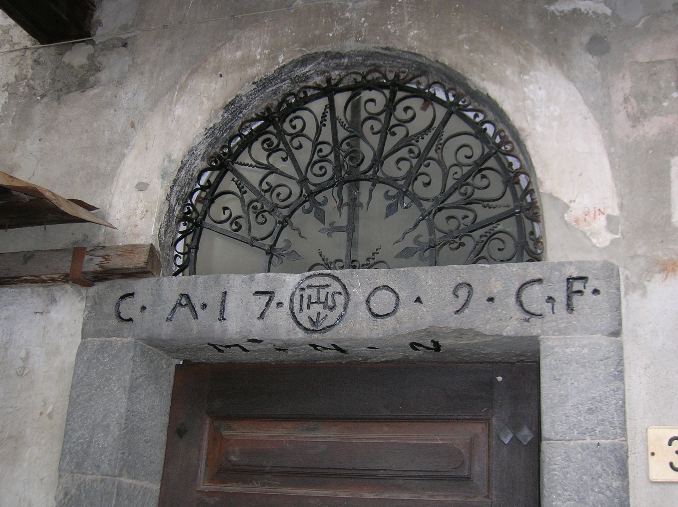 Dettaglio della data sullo stipite della casaforte La Tour, Valpelline, Valle d'Aosta, Italia.